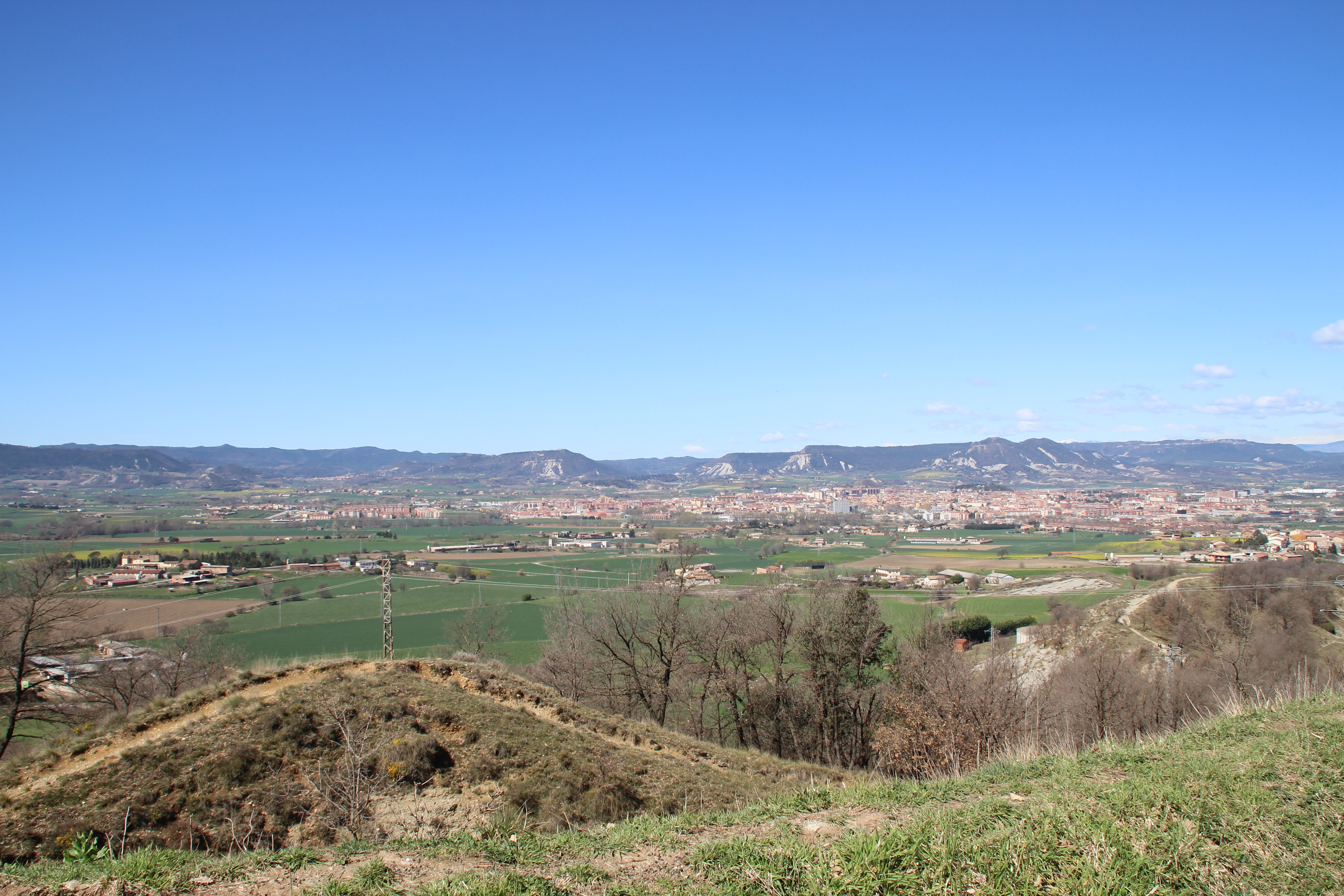 panoràmica